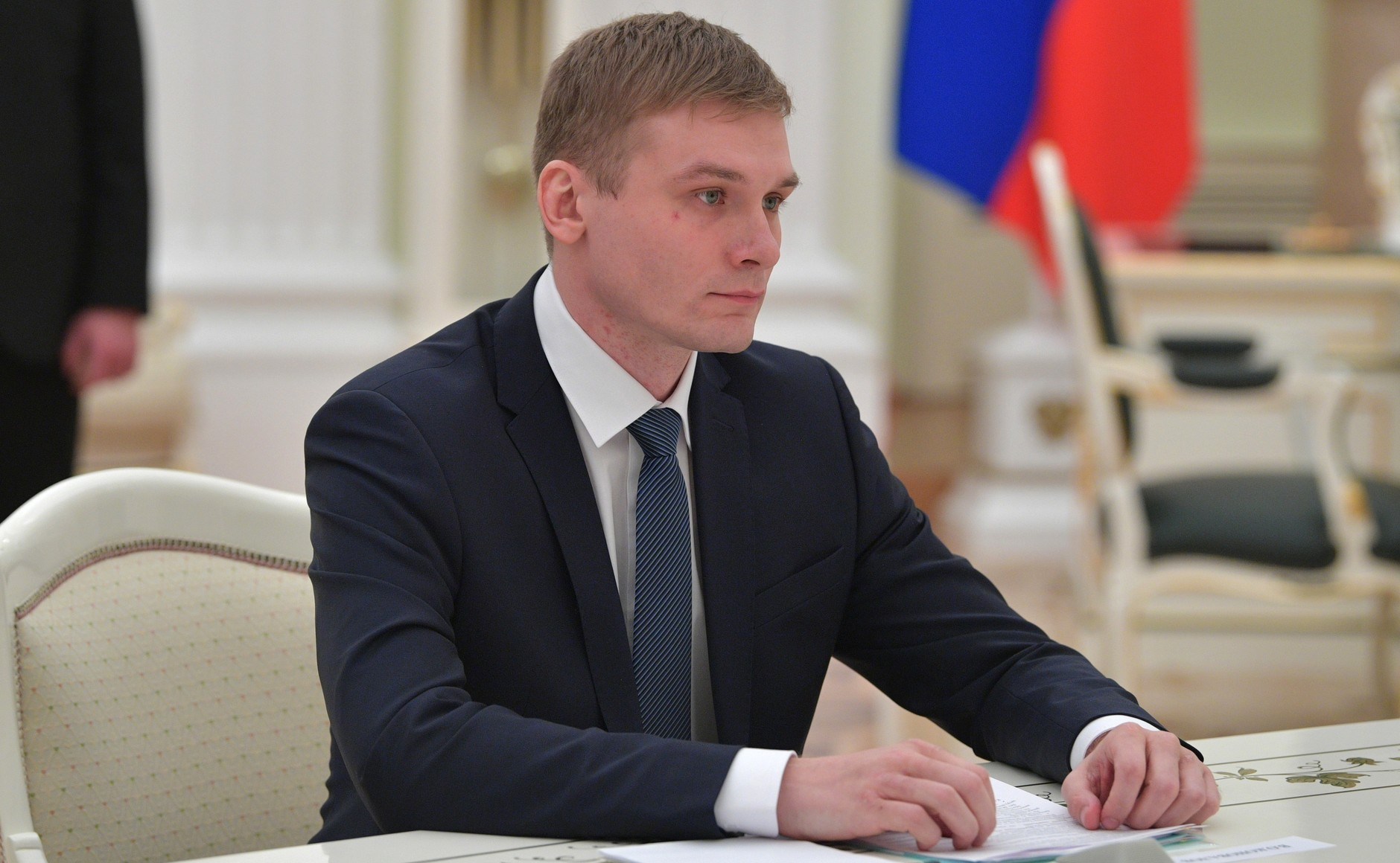 Глава Республики Хакасия – председатель правительства Республики Хакасия Валентин Коновалов во время встречи с Президентом России Владимиром Путиным